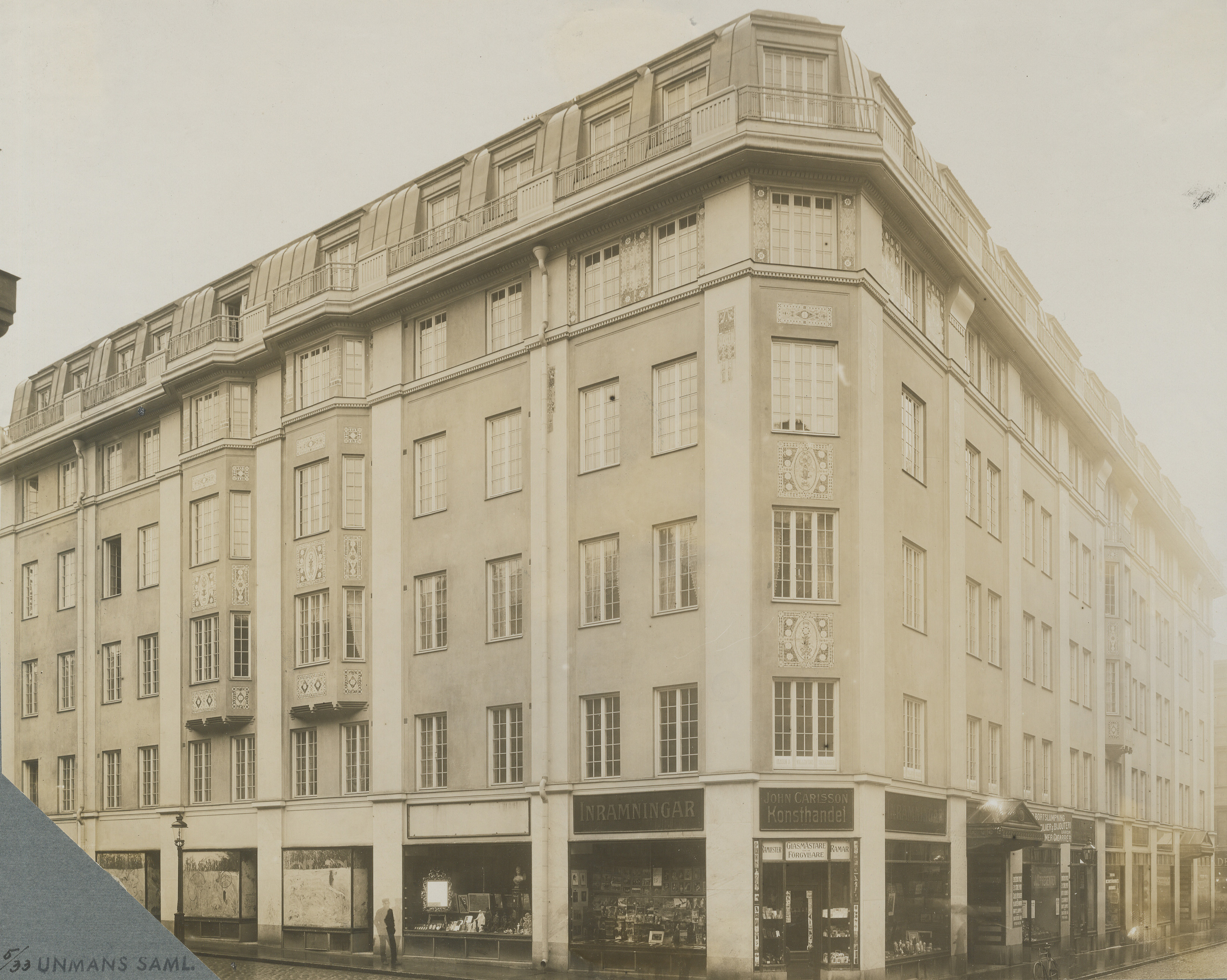 Centralvaruhuset Stockholm